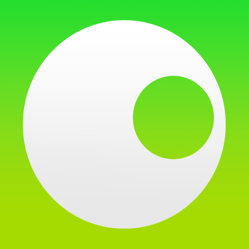 Avatar wouzee, verde y blanco.